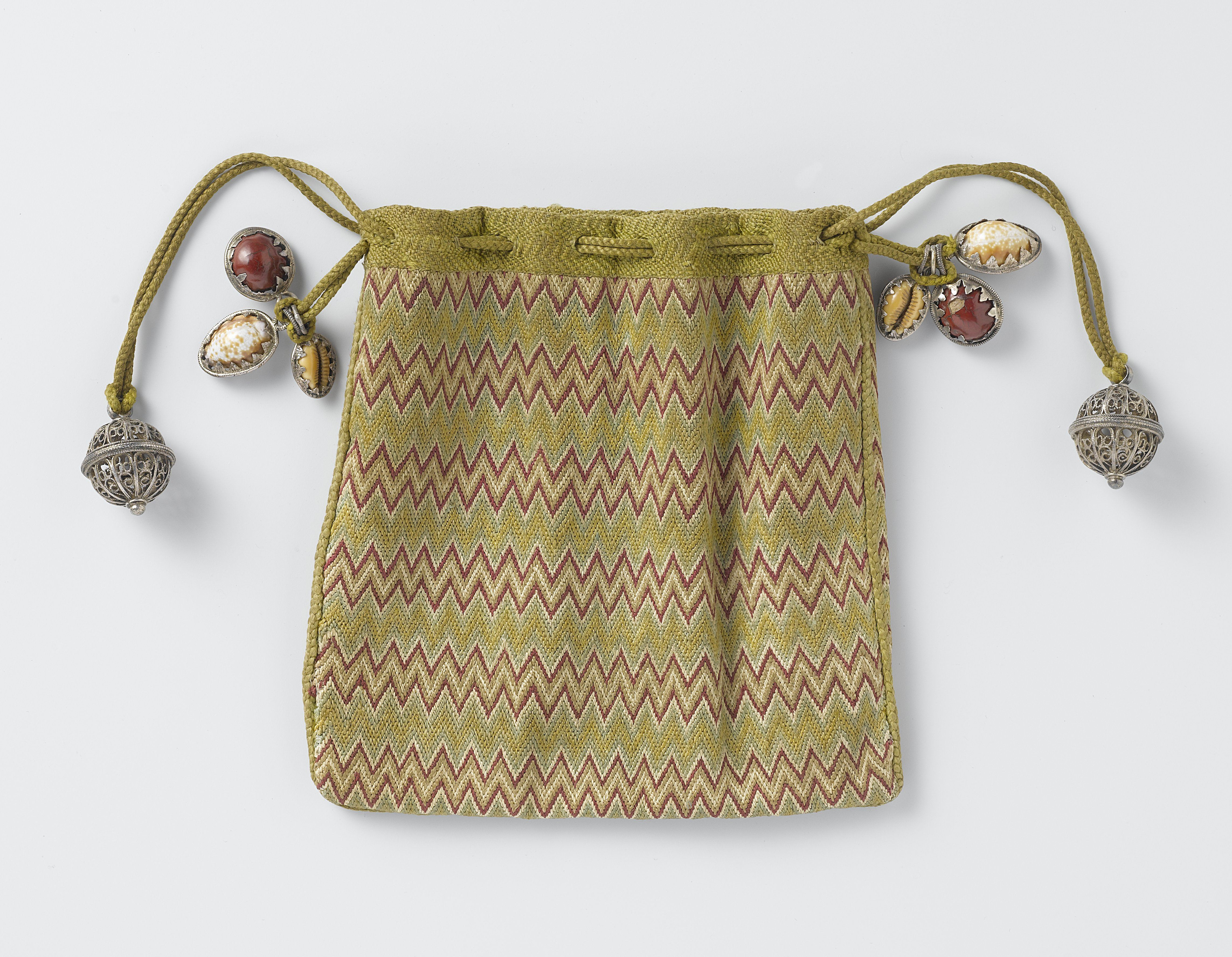 Buidel, geborduurd met zigzagpatroon (point d'Hongrie), in groene, witte en roodbruine zijde met trekkoord voorzien van zilveren pommanders, in zilver gevatte schelpen en 'bezoar', anoniem, ca. 1675 - ca. 1700 Identificatieː Buidel, geborduurd met zigzagpatroon (point d'Hongrie) in groene, witte en roodbruine zijde met trekkoord voorzien van zilveren pommanders, in zilver gevatte schelpen en 'bezoar' Objecttypeː buidel knottepong Objectnummerː BK-NM-8535 Omschrijvingː Buidel, geborduurd met zigzagpatroon (point d'Hongrie) in groene, witte en roodbruine zijde met trekkoord voorzien van zilveren pommanders, in zilver gevatte schelpen en 'bezoar' ('steen' uit de maag en het darmkanaal van herkauwers). Model: plat en vierkant. Op de naden een gevlochten zijden koord. Versiering: ajour gesneden zilveren reukbollen of pommanders, schelpen gevat in een zilveren rand met ring, net zoals bezoar. Vervaardigingː Vervaardiger: anoniem Plaats vervaardigingː Friesland (mogelijk) Dateringː ca. 1675 - ca. 1700 Materiaal en Techniekː Fysieke kenmerkenː Zijde, zilver, schelpen, bezoar Materiaalborduurwerk: zijde trekkoord: zijde reukbollen: zilver zettingen: zilver schelp: schelp bezoar: steen (materiaal) Techniekː borduren / point d'Hongrie / vlechten / smeden Afmetingen geheel: h 15 cm × b 15 cm Verwerving en rechten Verwervingː 1888 Copyrightː Publiek domein Documentatie Accessorize! 250 objects of fashion and desire, Bianca M. du Mortier, Ninke Bloemberg, Milou van Rossum, p. 54-55